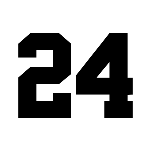 稲尾和久の永久欠番、背番号24